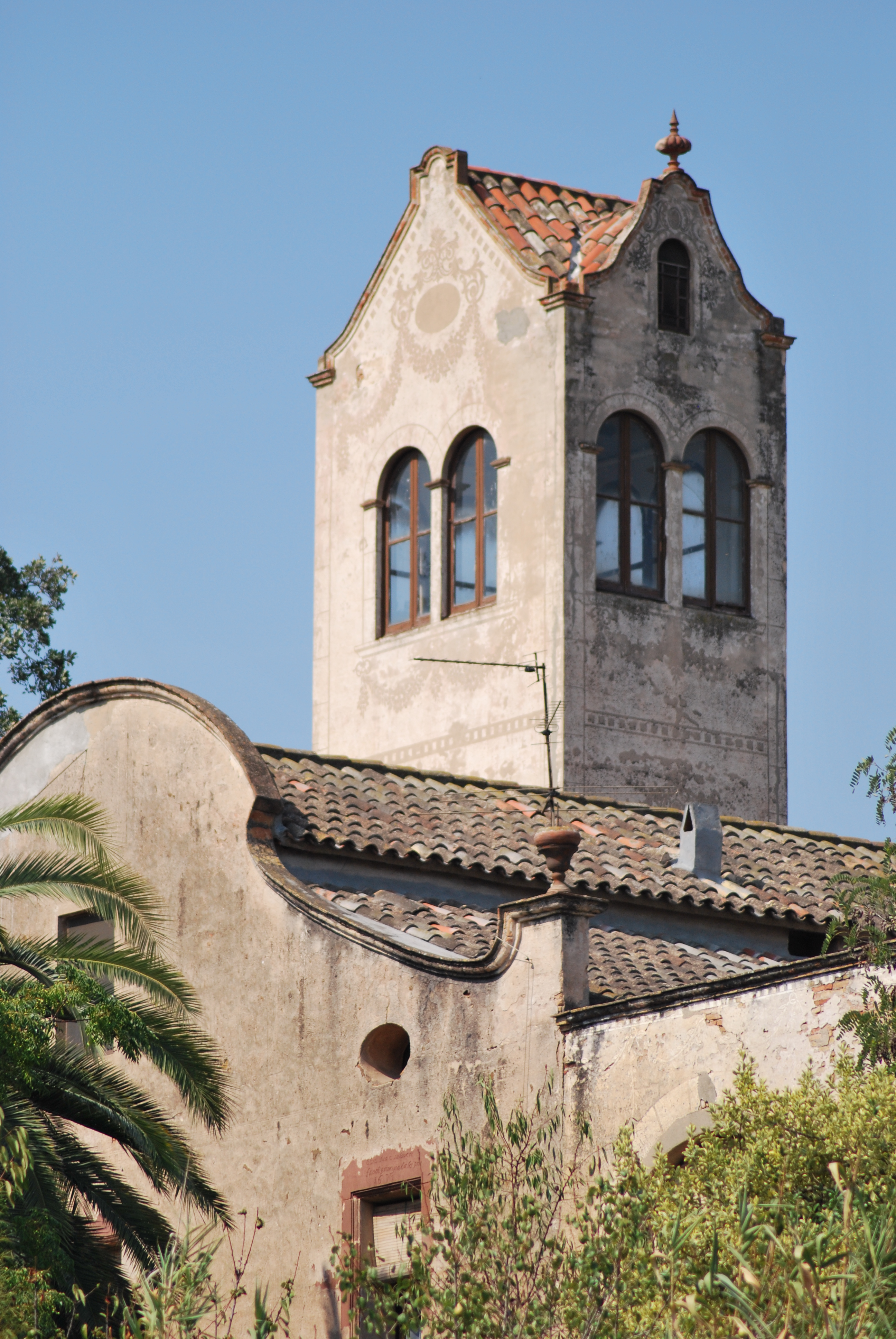 Can Pujador (Sant Vicenç dels Horts)